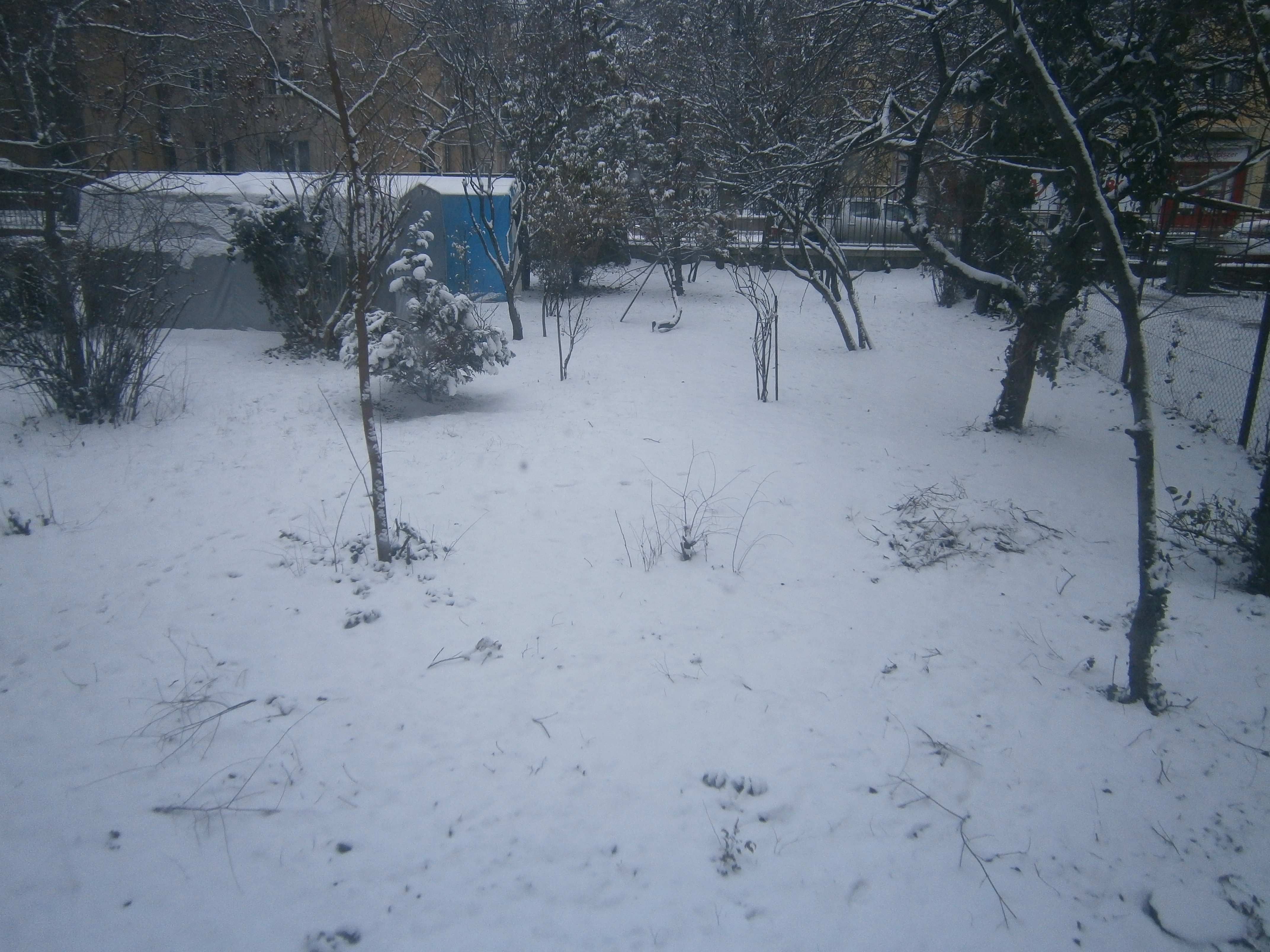 Morning with snow in Budapest